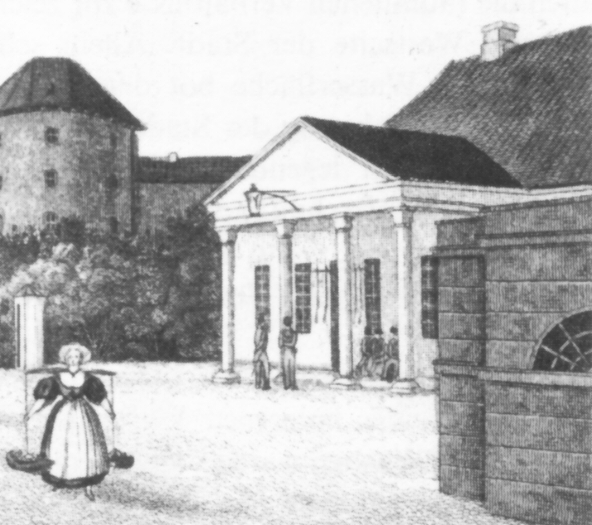 Das Wachgebäude vor dem Burgtor in Lübeck (erbaut 1767, abgebrochen 1878)